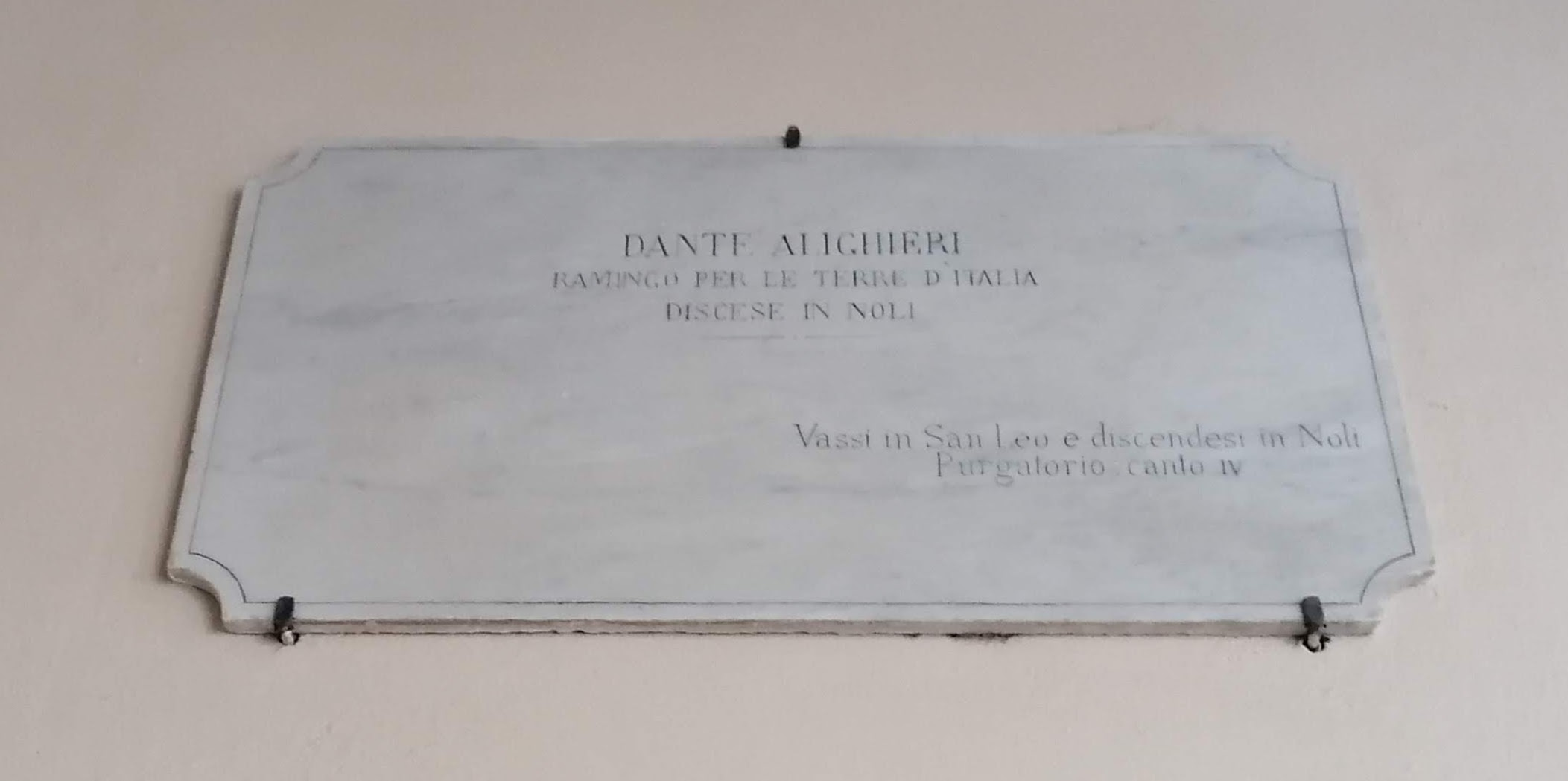 Targa commemorativa di Dante Alighieri nella Loggia della Repubblica Nolese.